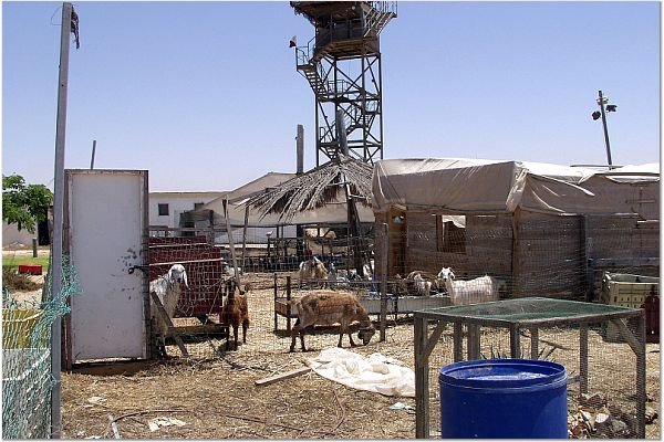 תל קטיפא התמונות באדיבות קטיף.נט (קישור) אתר האינטרנט של גוש קטיף. צילם: מוטי סנדר.